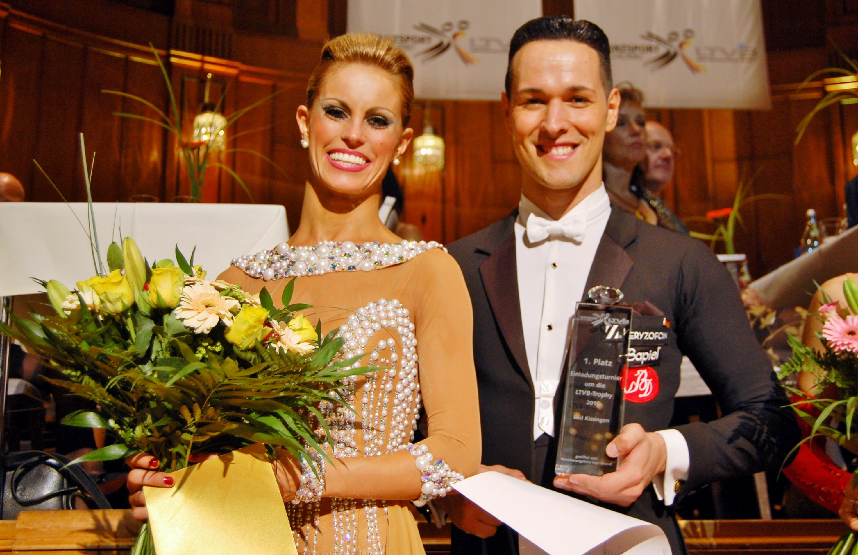 Simone Segatori und Annette Sudol, Weltmeister der Amateure in den Standardtänzen, als Sieger der LTVB-Trophy 2015 in Bad Kissingen